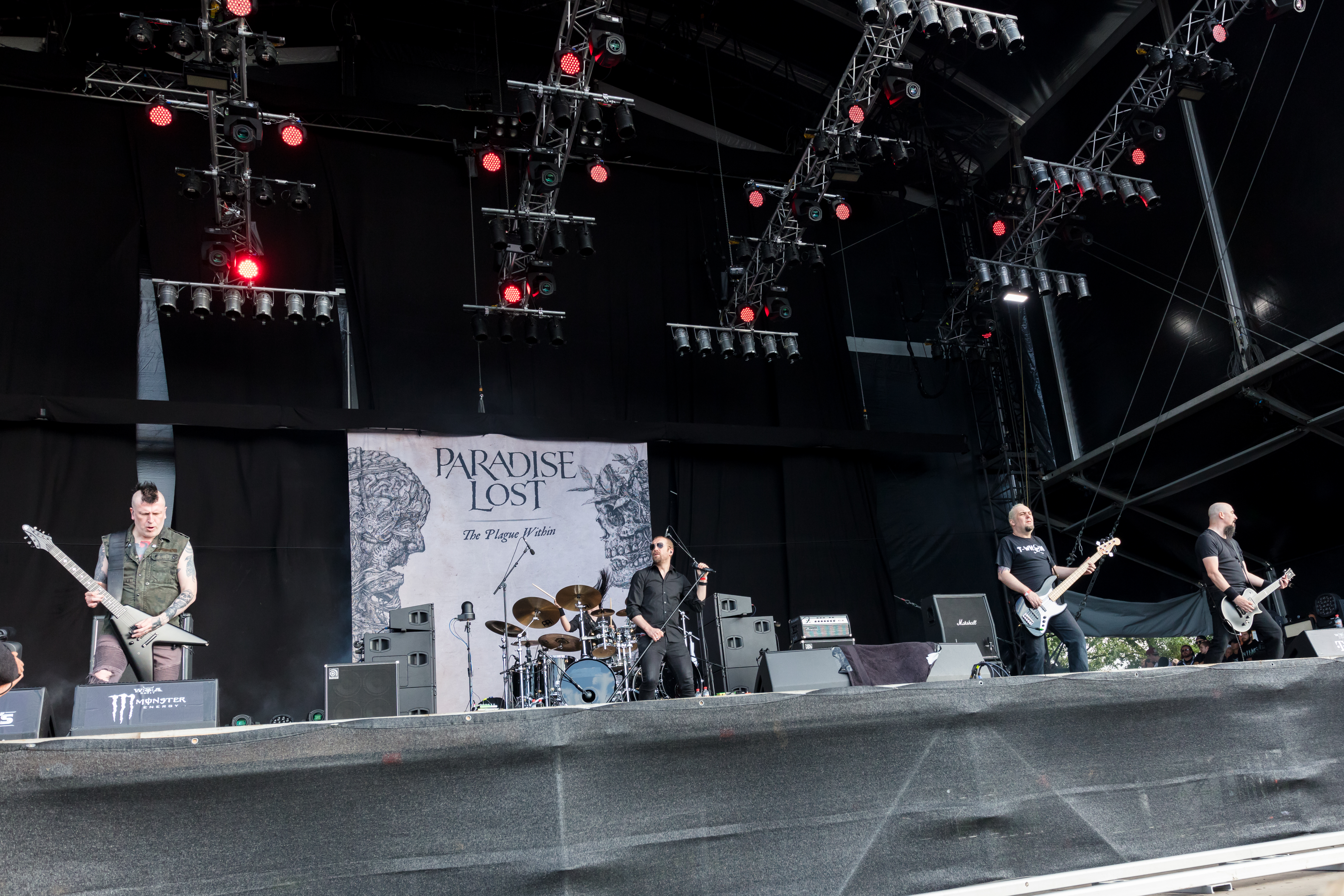 Paradise Lost during Wacken Open Air at Schleswig-Holstein, Wacken, , Germany on 2017-08-04, Photo: Sven Mandel